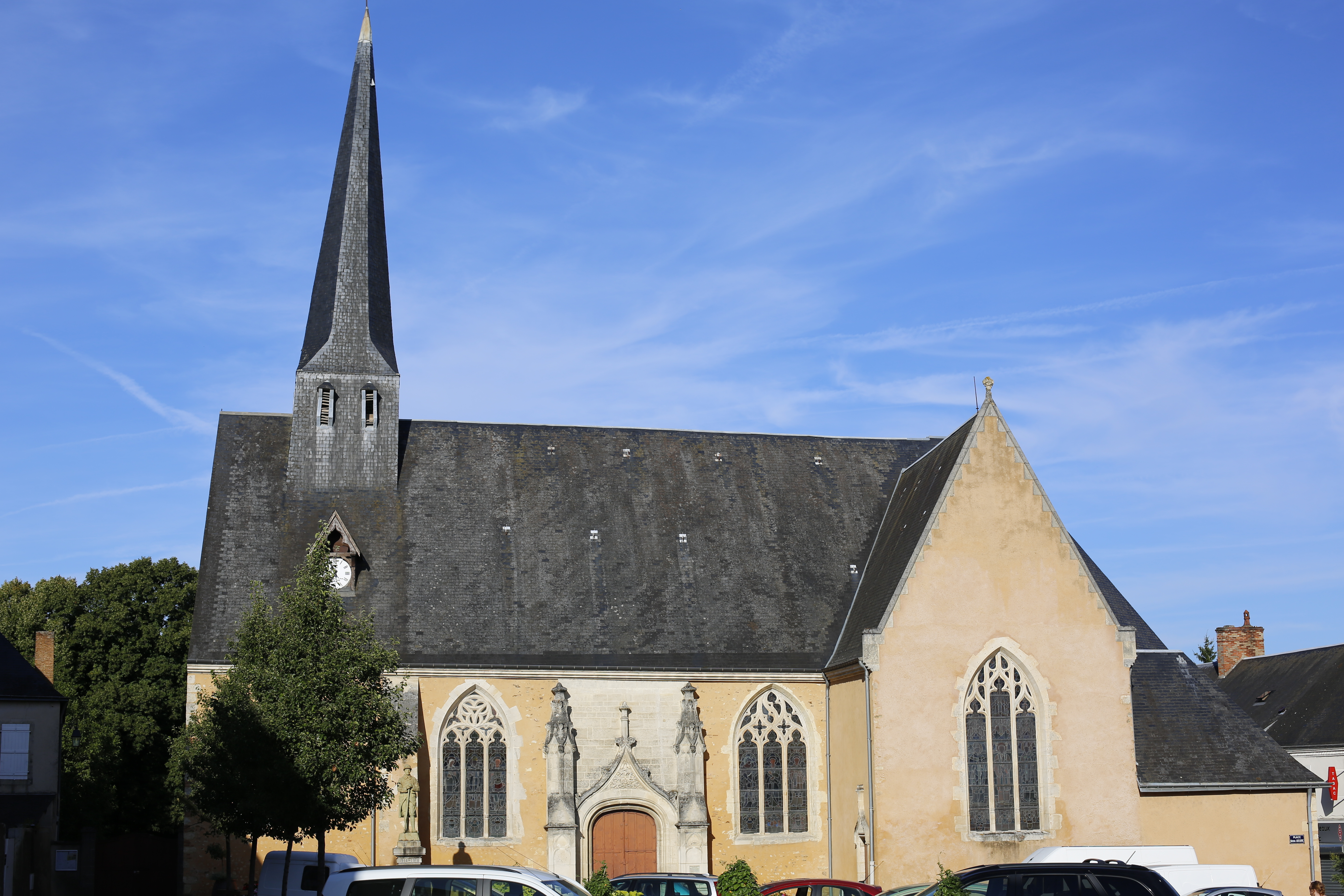 Église Saint-Pierre-et-Saint-Paul de Tuffé.